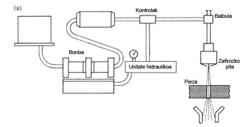 Ur zurrusta bidezko mozketa